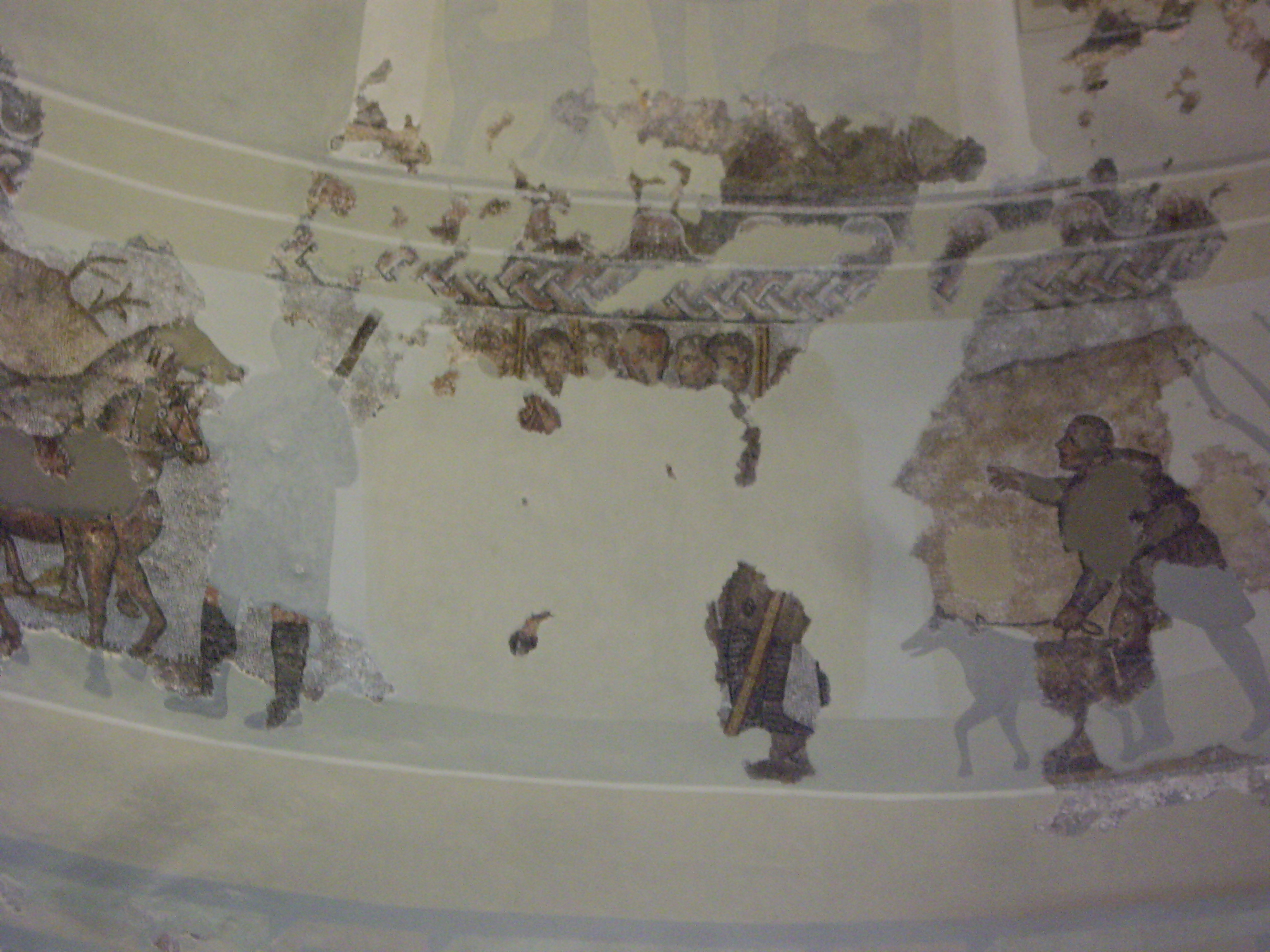 Grup de persones presidint les escenes de cacera, possiblement al centre estiga el difunt.